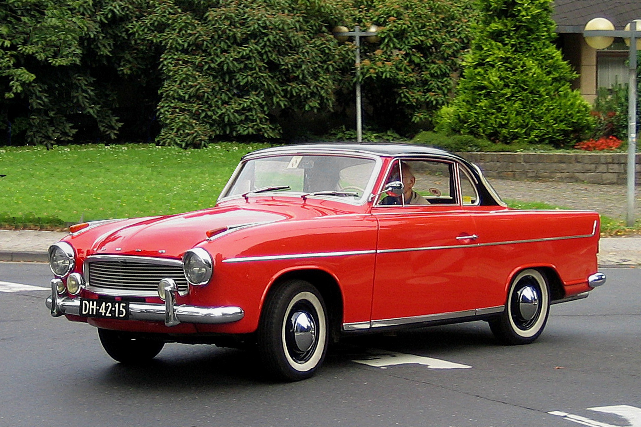 Hansa 1100 Coupé beim Borgwardtreffen in Andernach